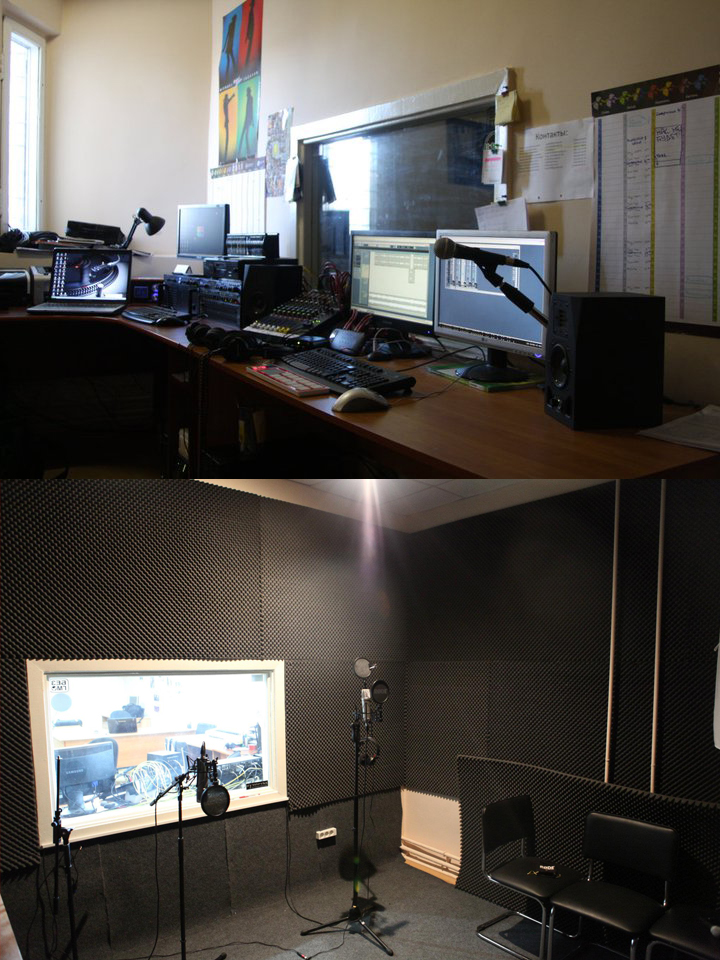 Студія Радіо КПІ. Контрольна кімната (вгорі) та кімната звукозапису (знизу)